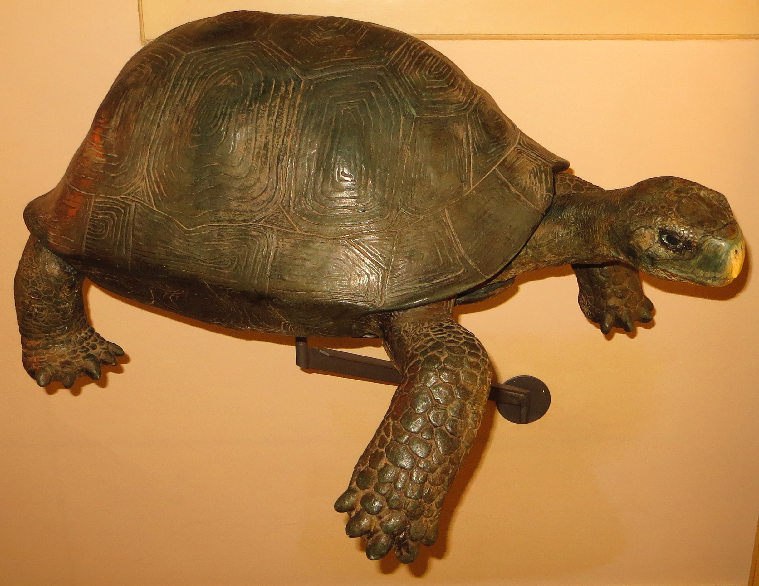 Geochelone, an extinct reptile- Took the picture at Museo de la Naturaleza y el Hombre - Tenerife